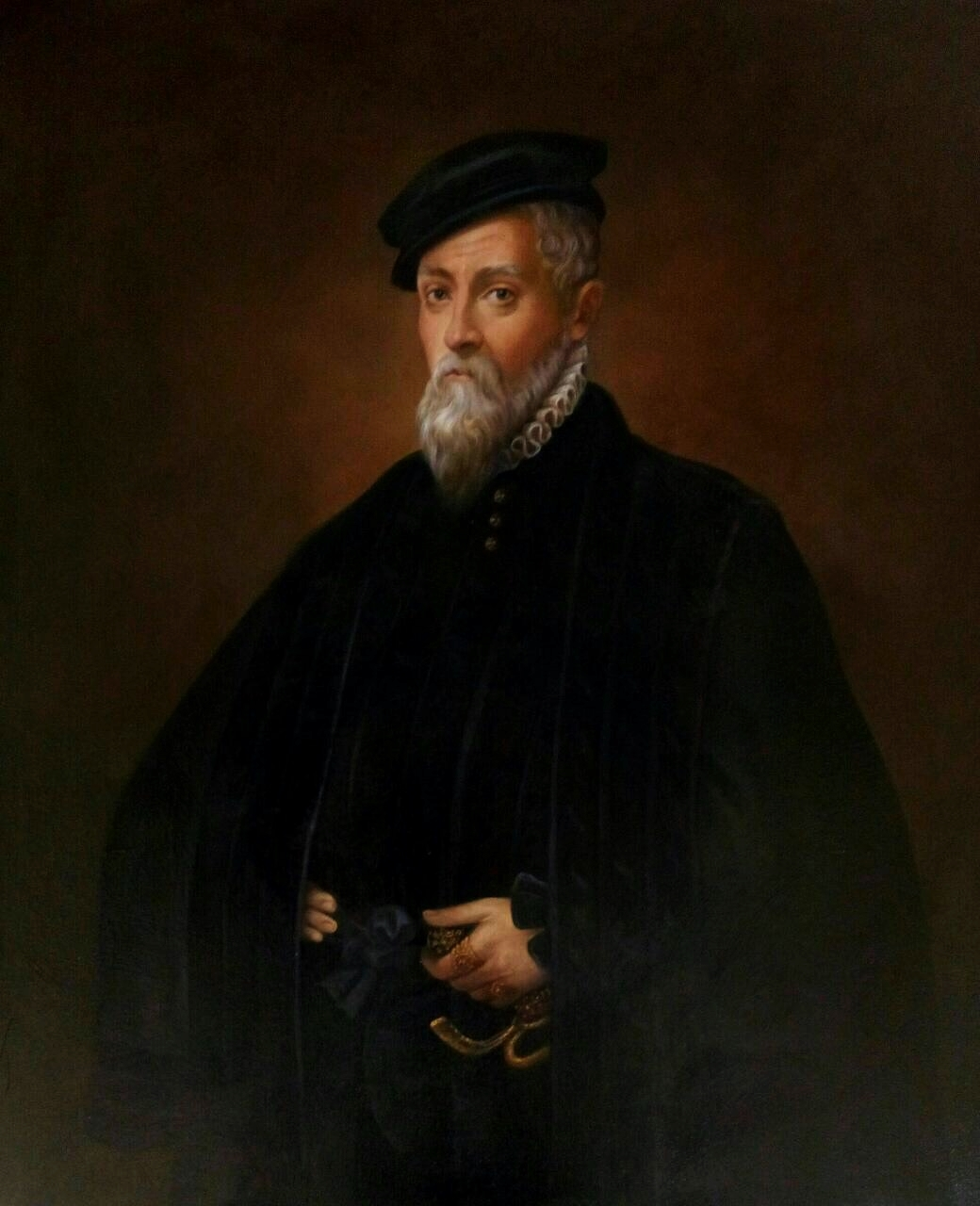 Francisco Vargas Mejia